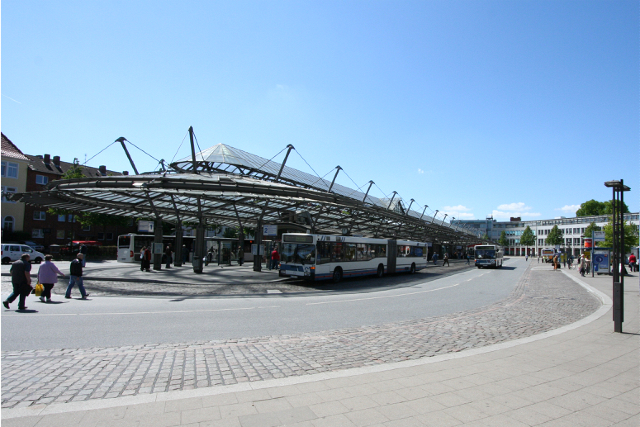 Zentraler Omnibus-Bahnhof (ZOB) in Lübeck